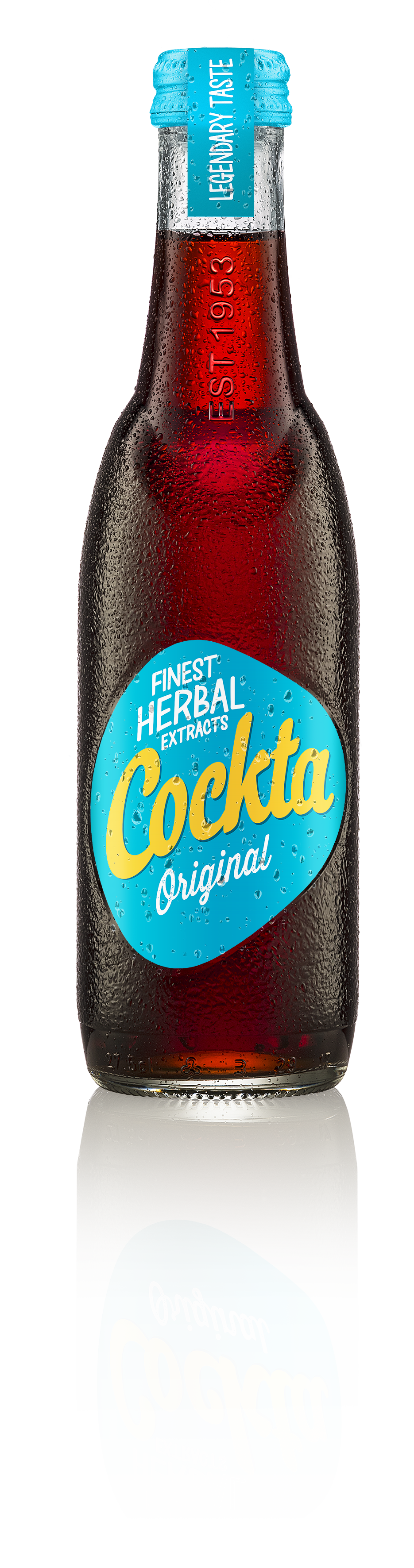 Cockta v 0,25-litrski steklenički